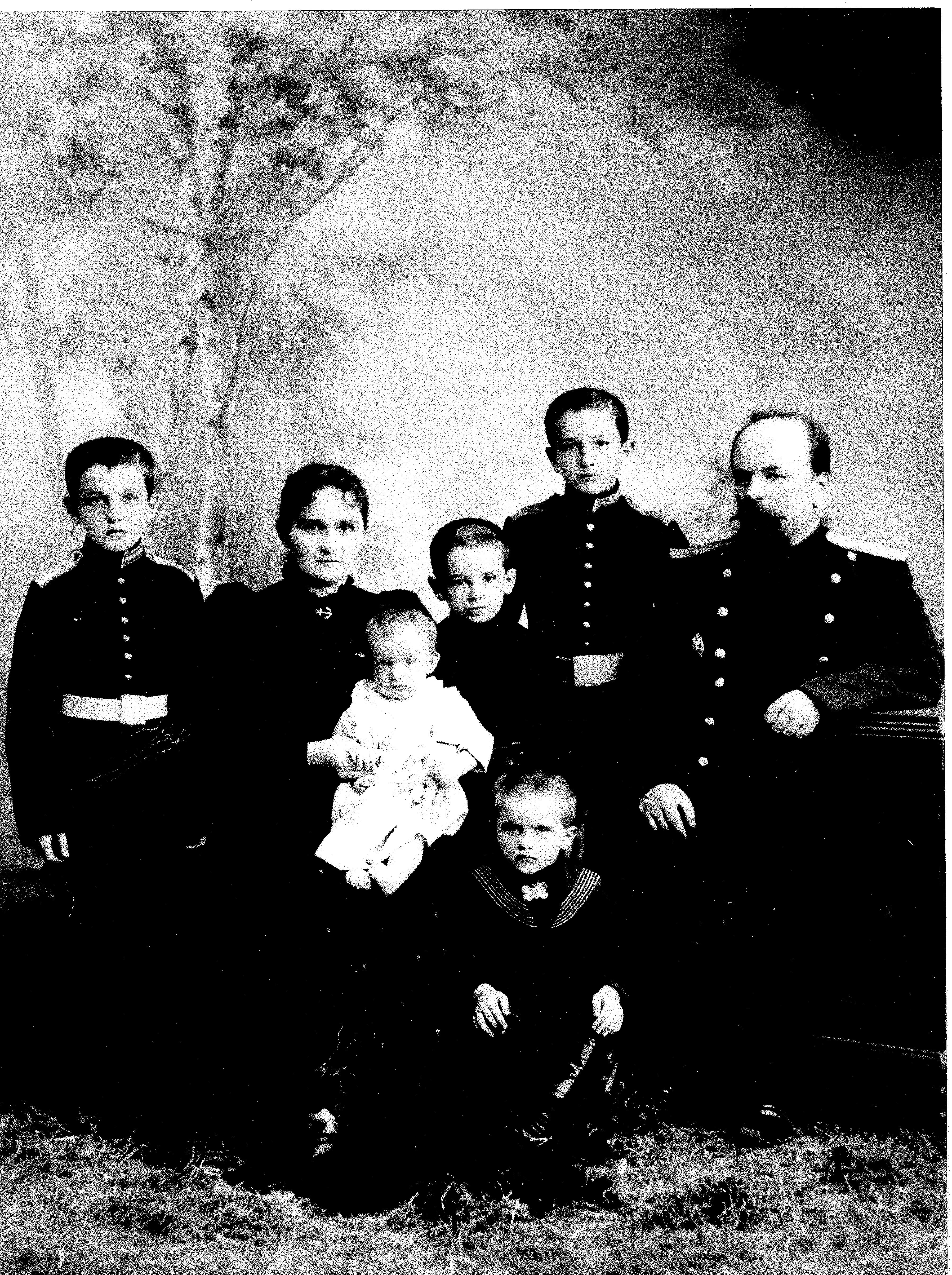 Семья Малаховского Степана Петровича, деда по отцу